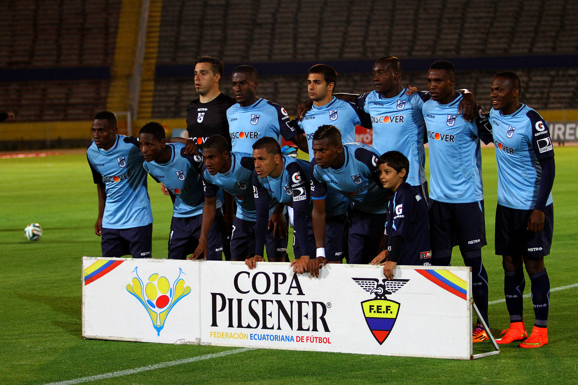 Quito, 13 de agosto de 2014 (Andes).- La Universidad Católica (celeste) se enfrentó en el estadio Olímpico Atahualpa a la Liga de Quito.